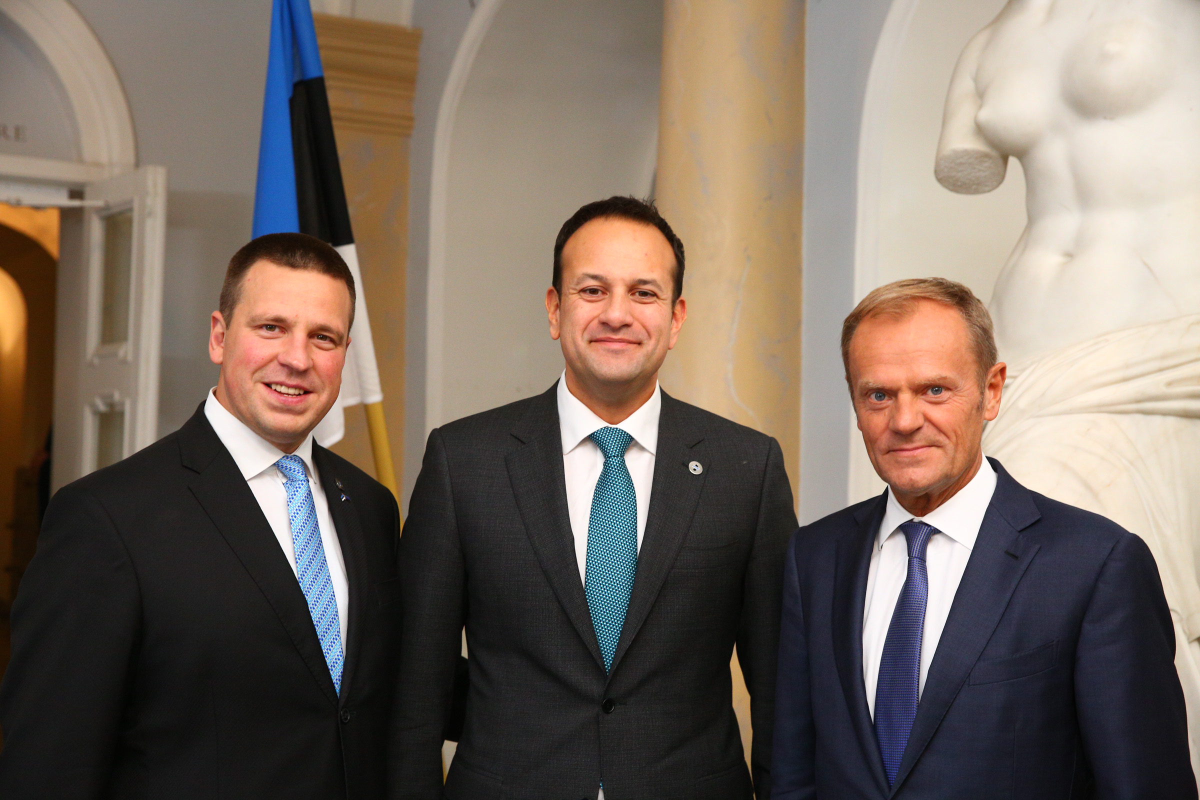 Photo: Arno Mikkor (EU2017EE)